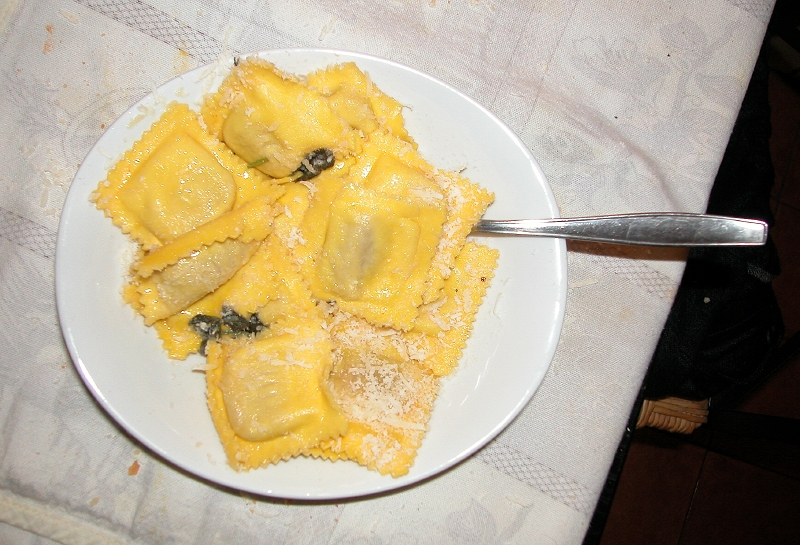 (andrea) Tortelli di zucca al burro e salvia